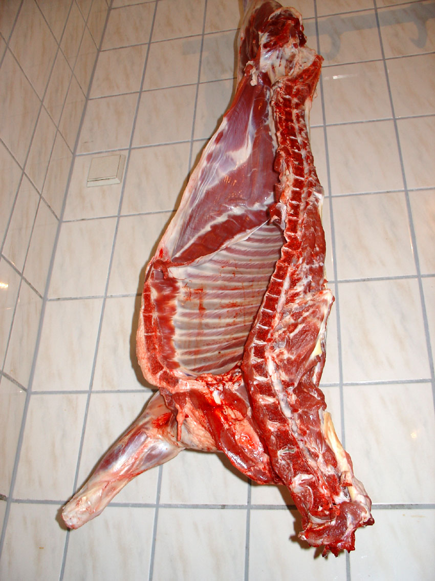 halbes Schaf